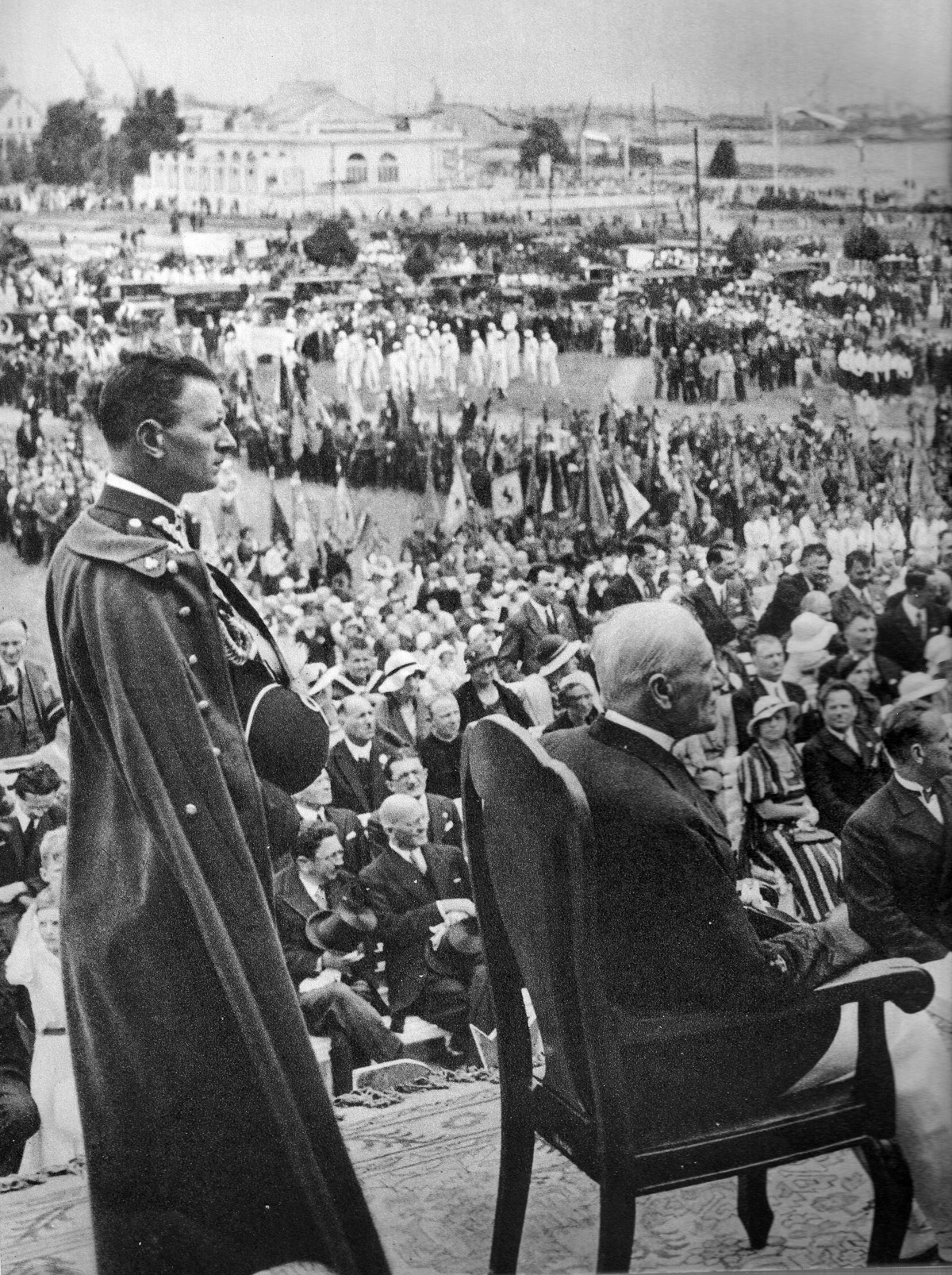 President Moscicki in Gdynia